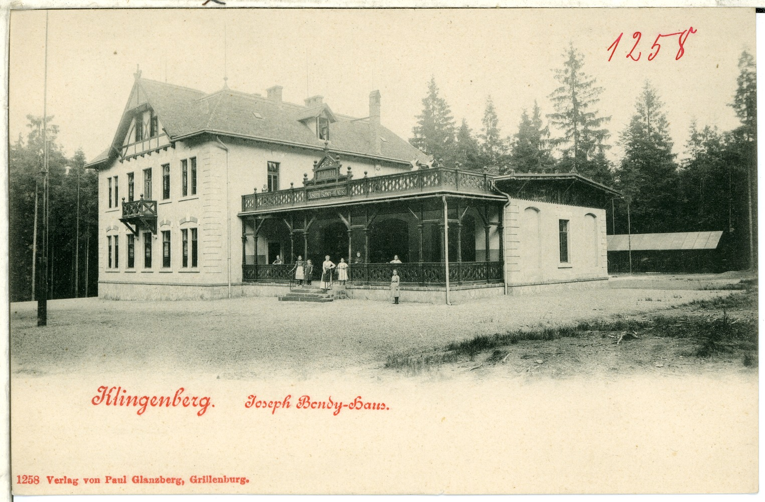 Klingenberg; Joseph Bondy-Haus This postcard is from publisher Brück & Sohn in Meißen ( This postcard has a unique number 01258 and is available in a higher resolution at the publisher. This images was uploaded in a cooperation project between Wikipedians and the publisher.